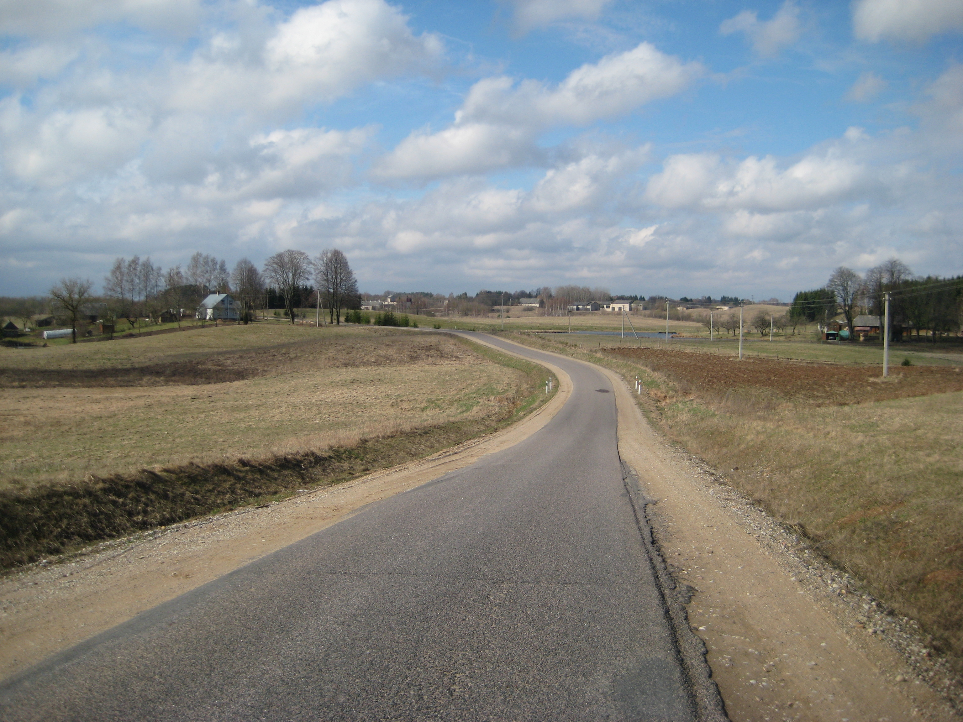 Dusetų sen., Lithuania